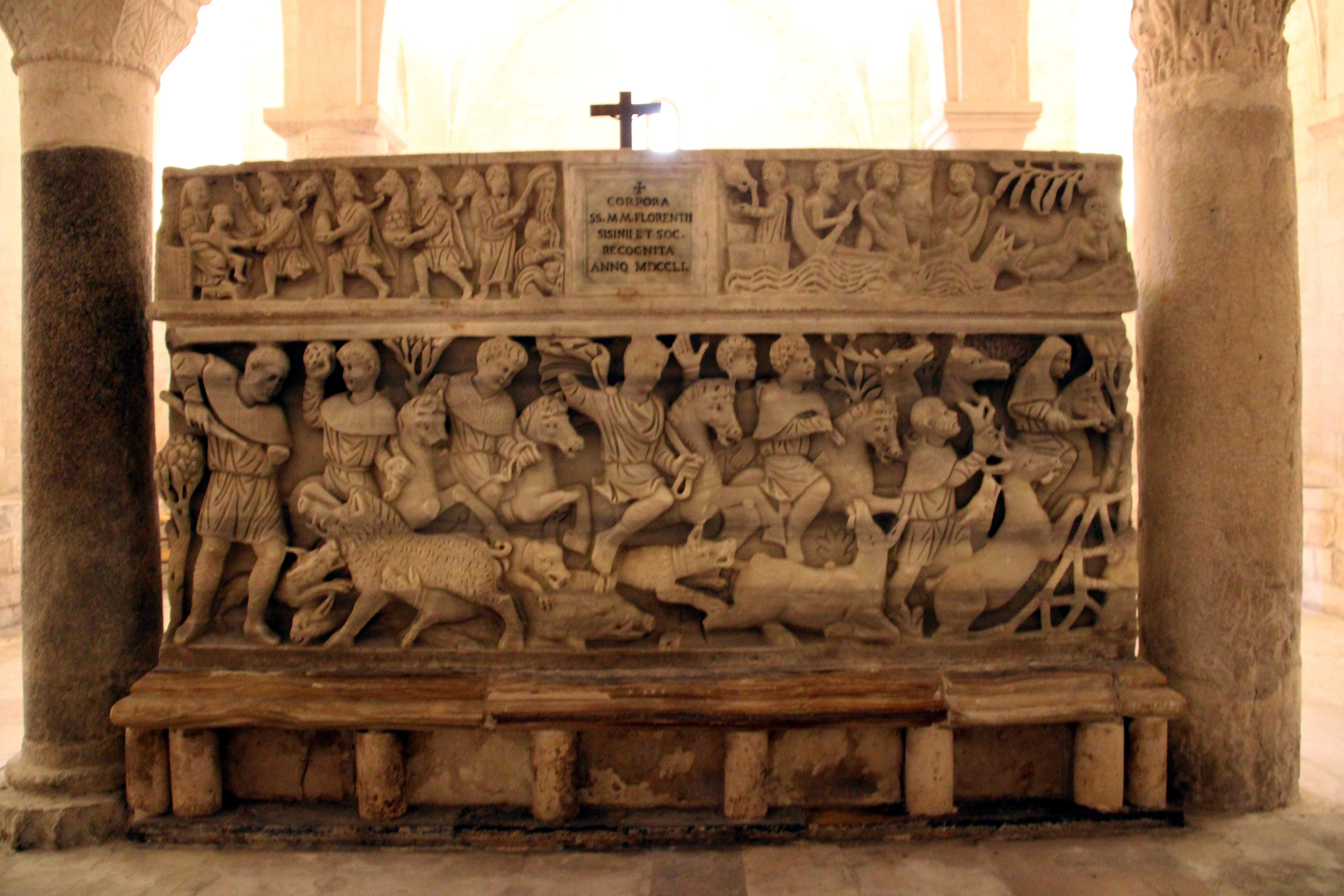 Concattedrale di San Leopardo (Osimo), cripta, Concattedrale di San Leopardo (Osimo), cripta, Sarcofago dei Ss. Diocleziano, Fiorenzo e compagni, scene di caccia al cinghiale e al cervo e nel coperchio, scene dall'Antico e Nuovo Testamento